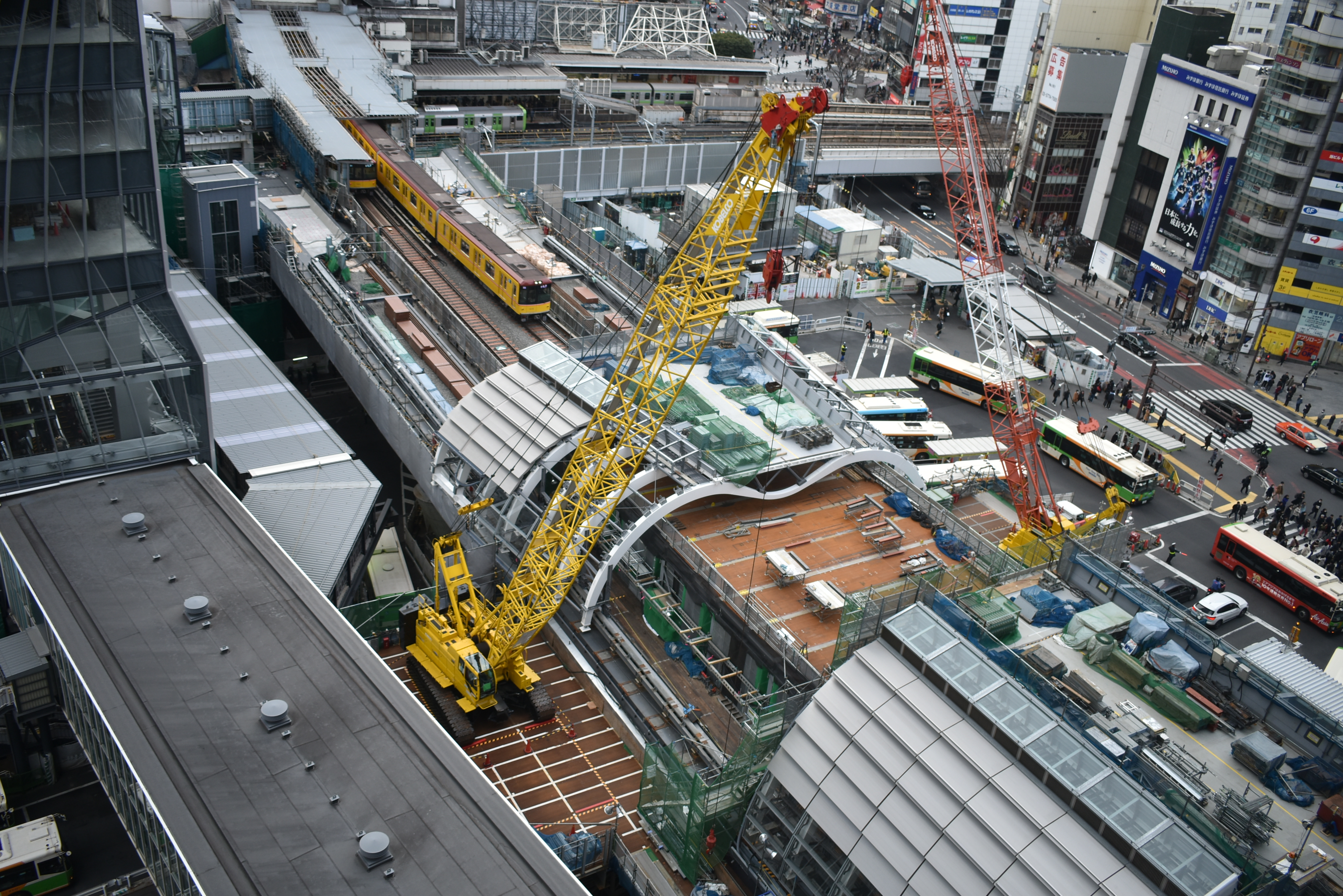 東京メトロ銀座線渋谷駅 Nikon D3400